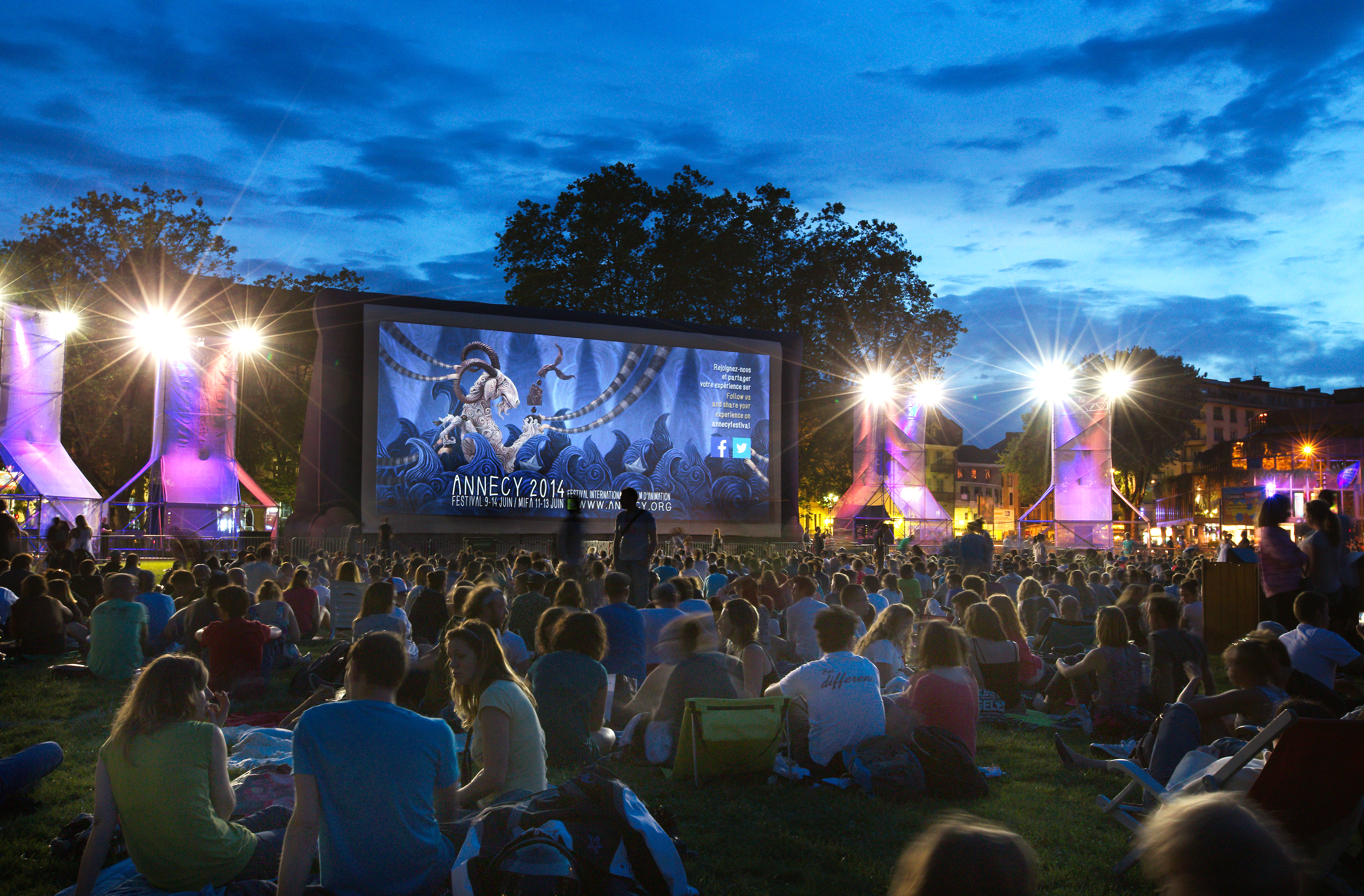 projection plein air durant le festival